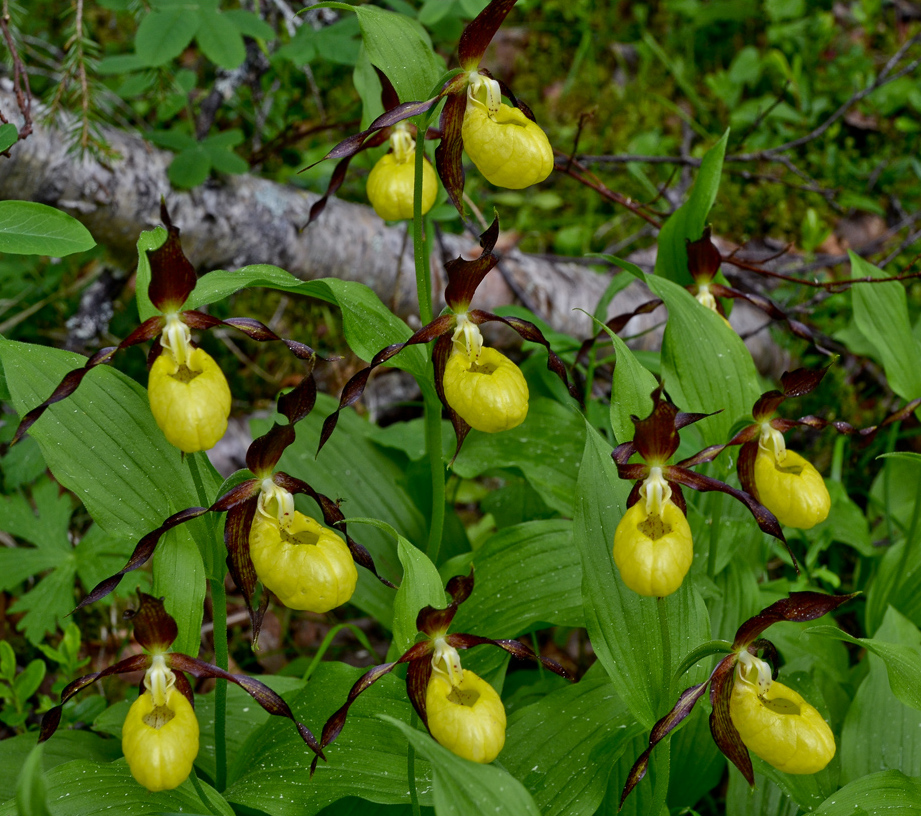 Паанаярви: Западная граница национального парка совпадает с государственной границей России с Финляндией. Со стороны финской границы к “Паанаярви” примыкает национальный парк “Оуланка”,Лоухский район, This image is related to the protected area of Russia number 1000069